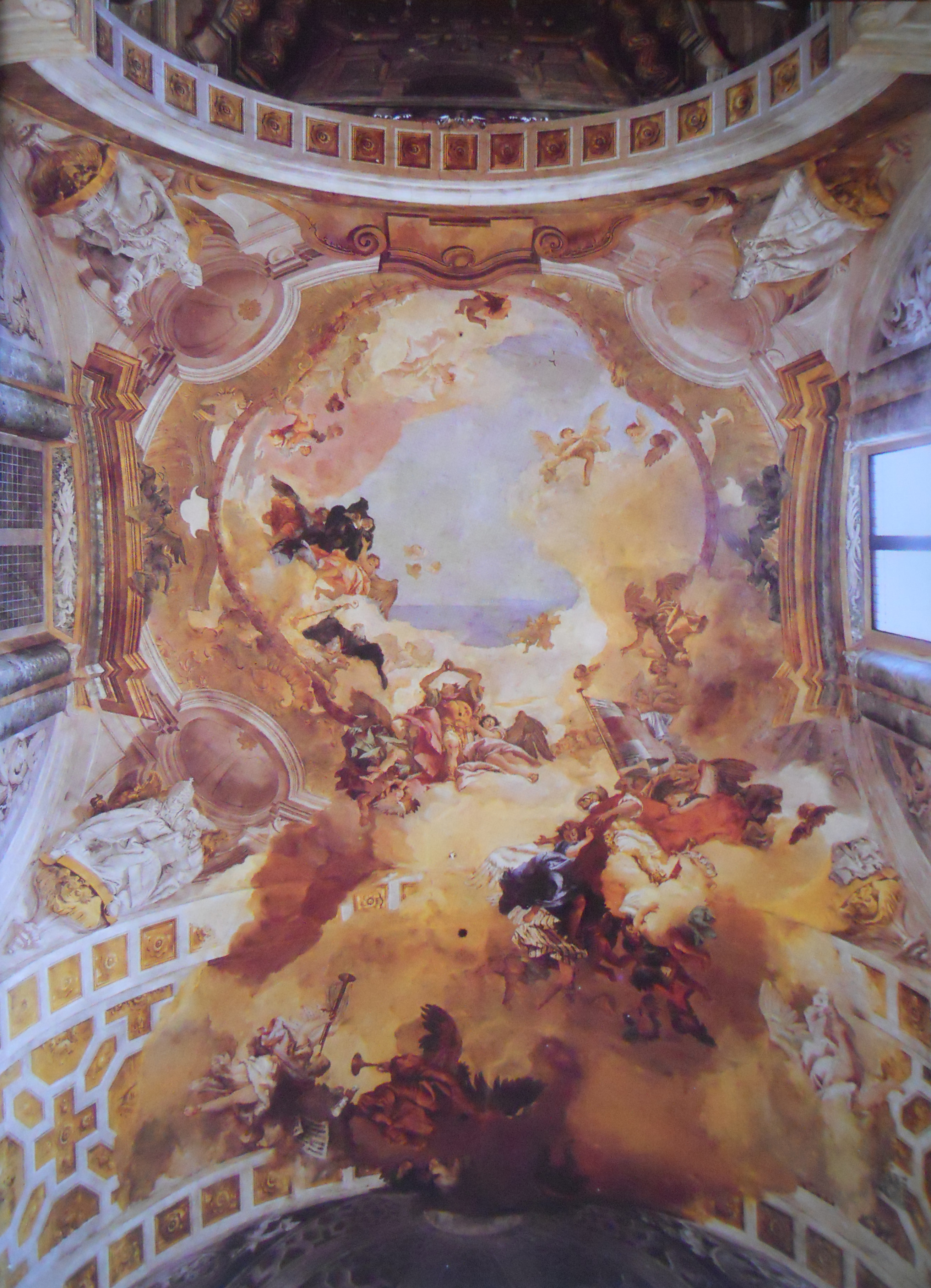 overview